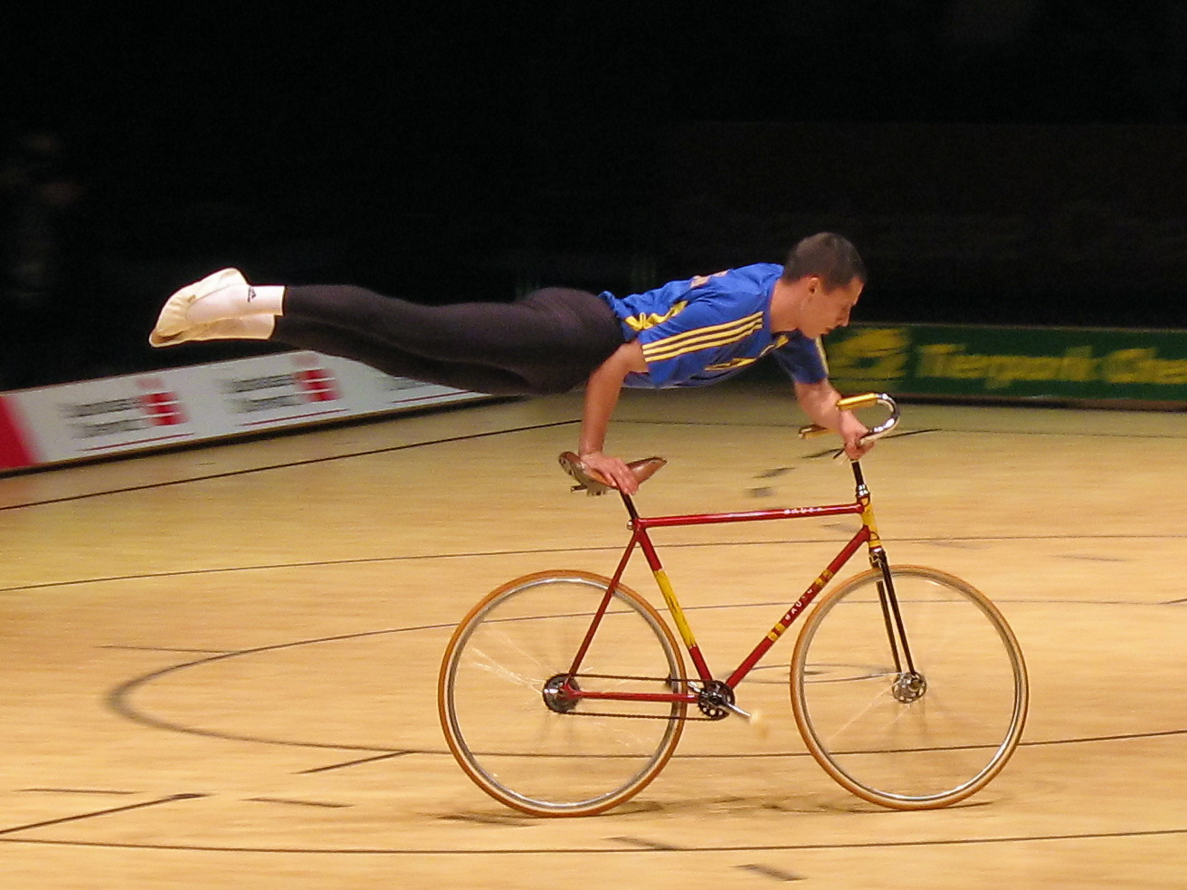 Artistic cycling competition at the UCI Indoor Cycling World Championships 2006 in Chemnitz (Germany)